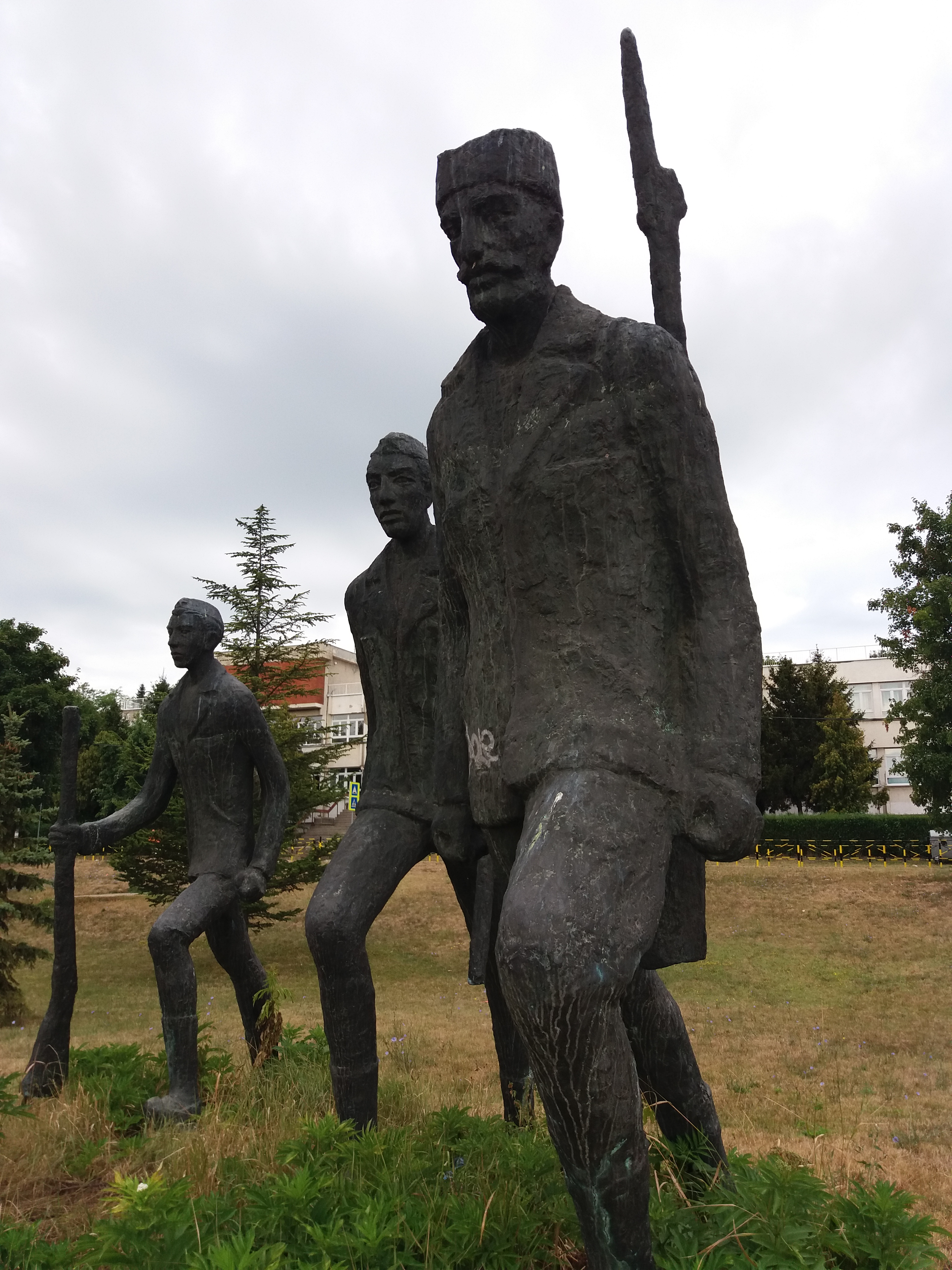 Srpski (latinica): Spomenik palim borcima, Selevac